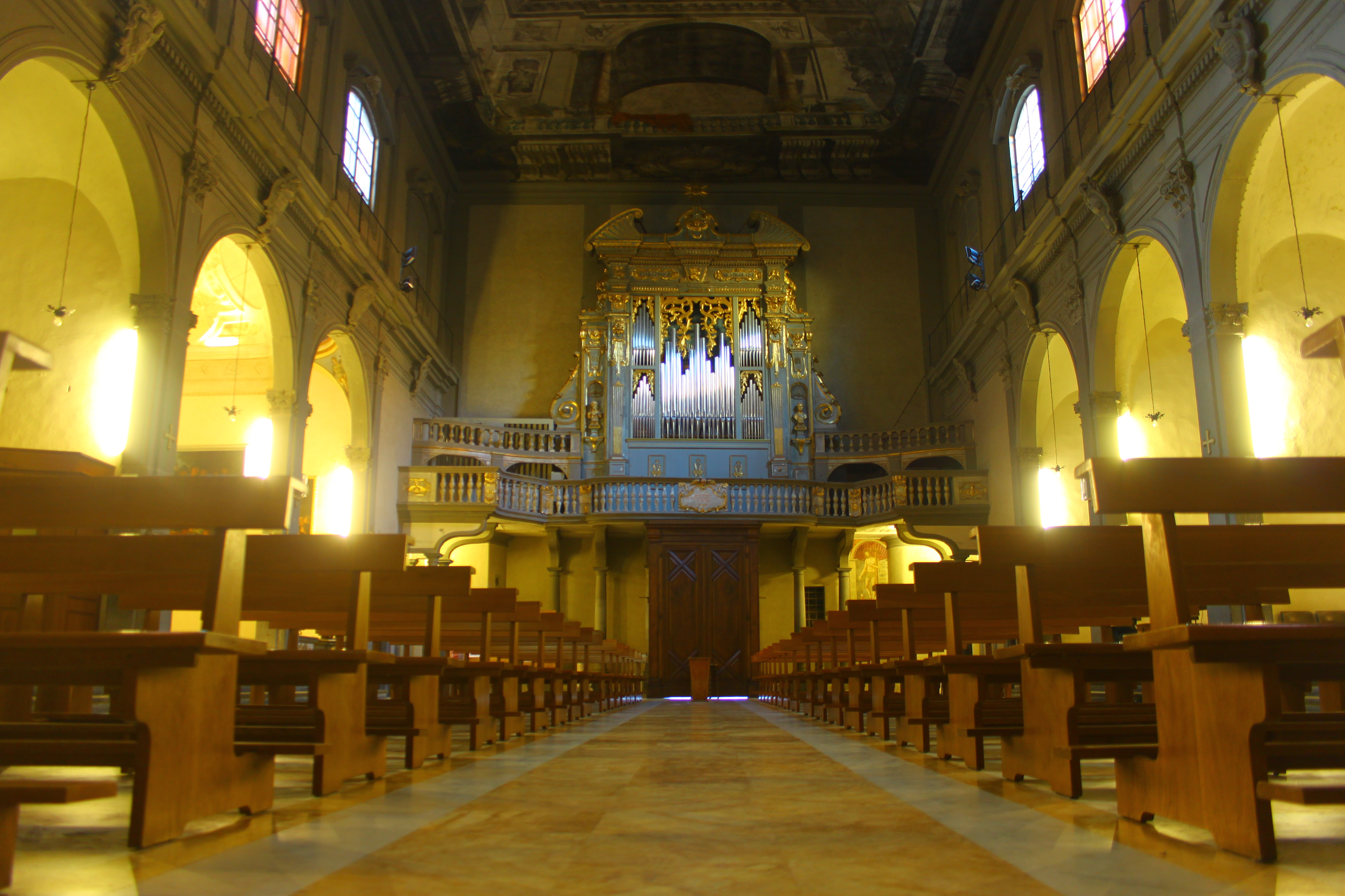 Organo della collegiata di sant'andrea in Empoli